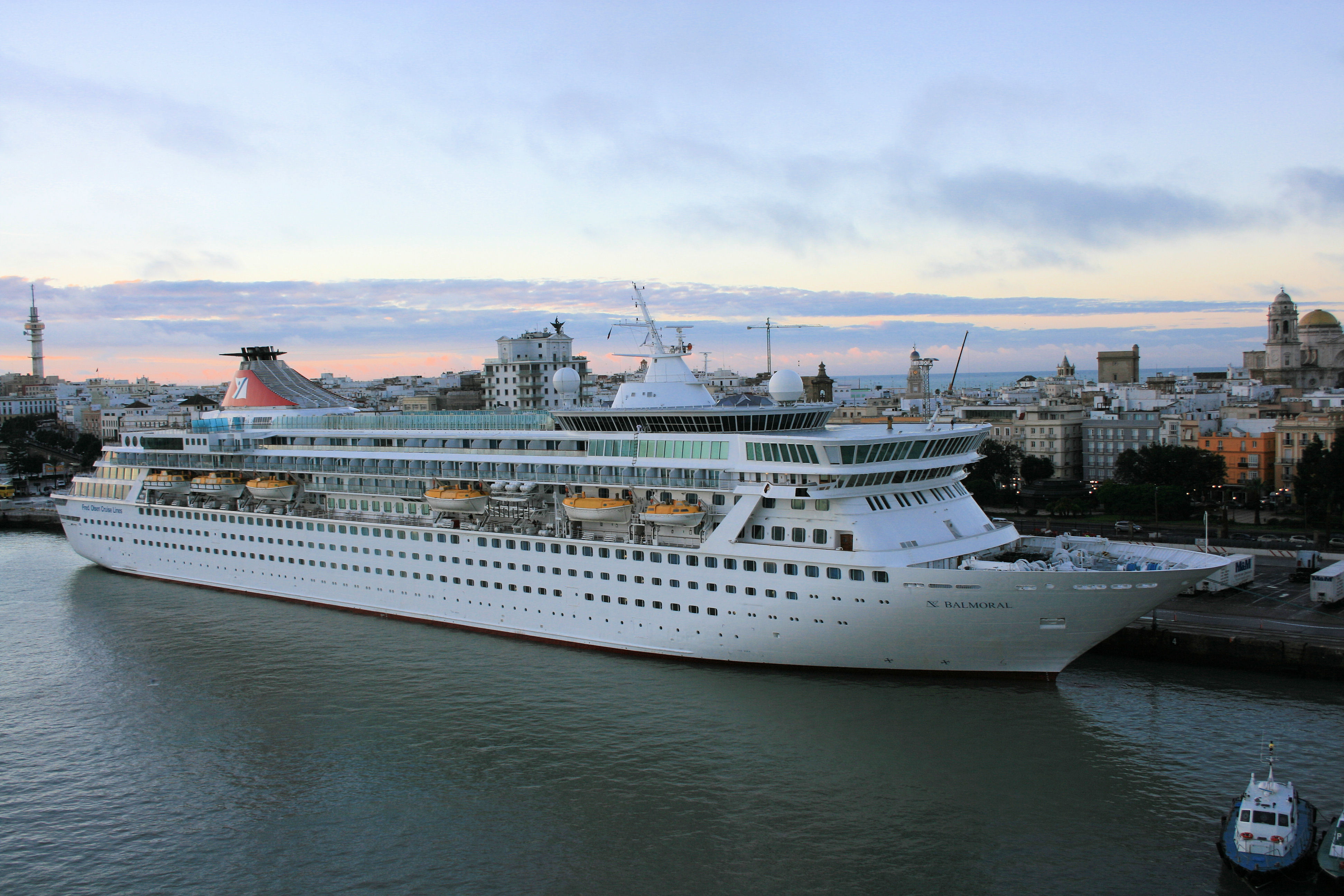 Balmoral